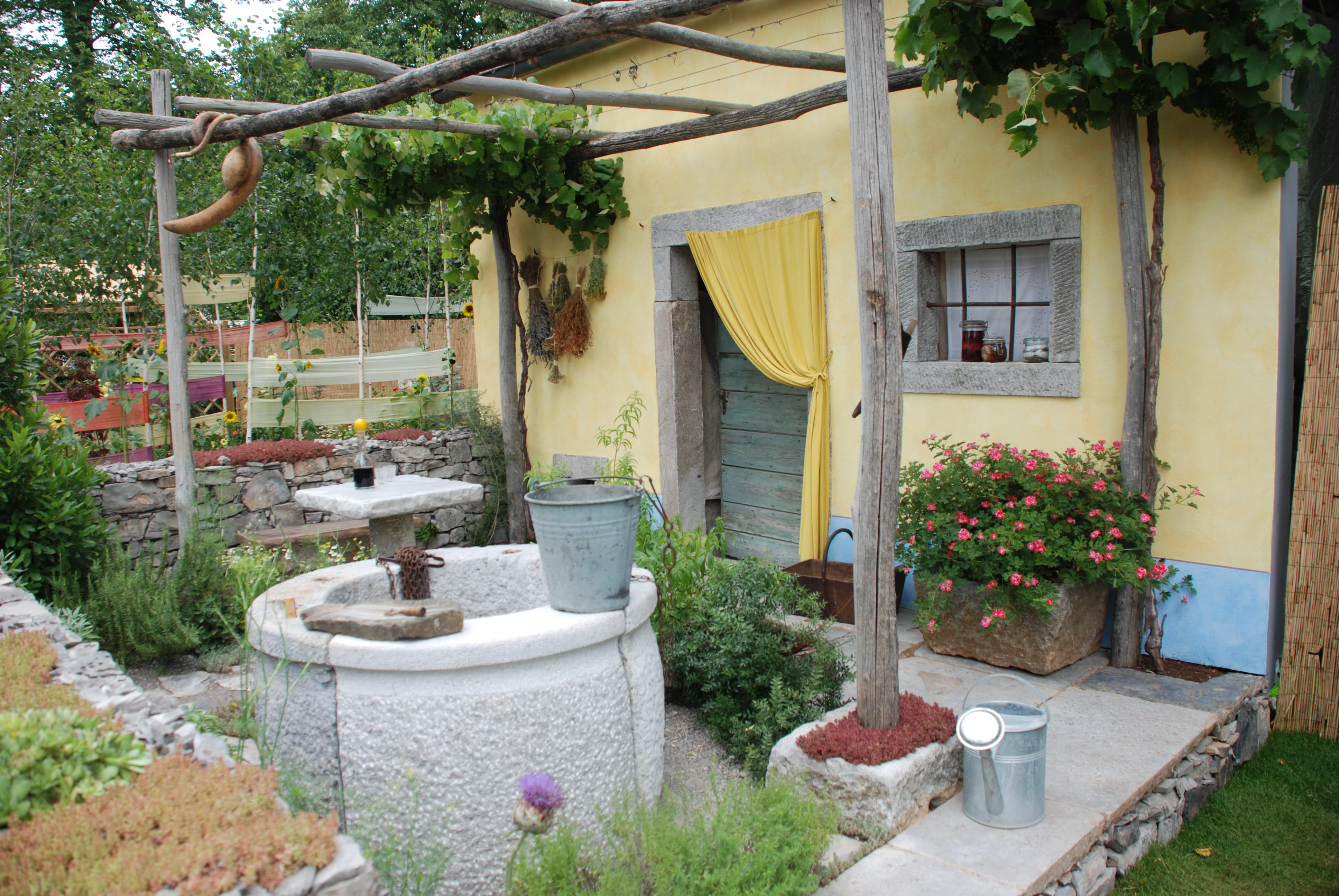 Pepin kraški vrt v Londonu